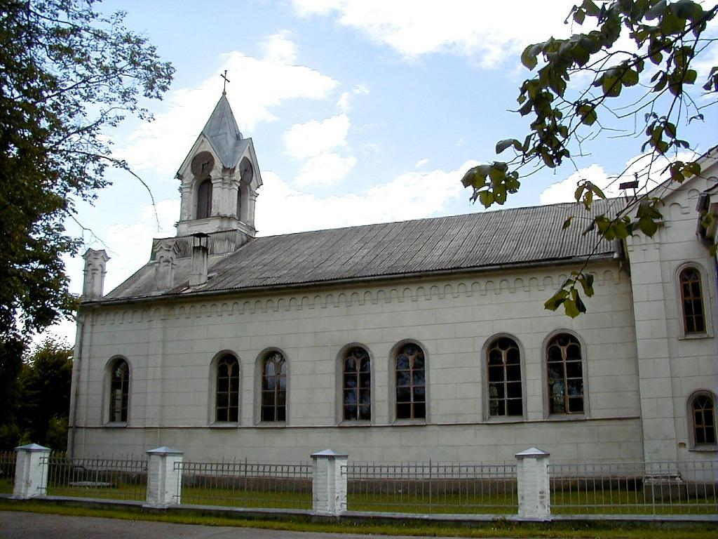 Slokas baznīca 2000-08-04